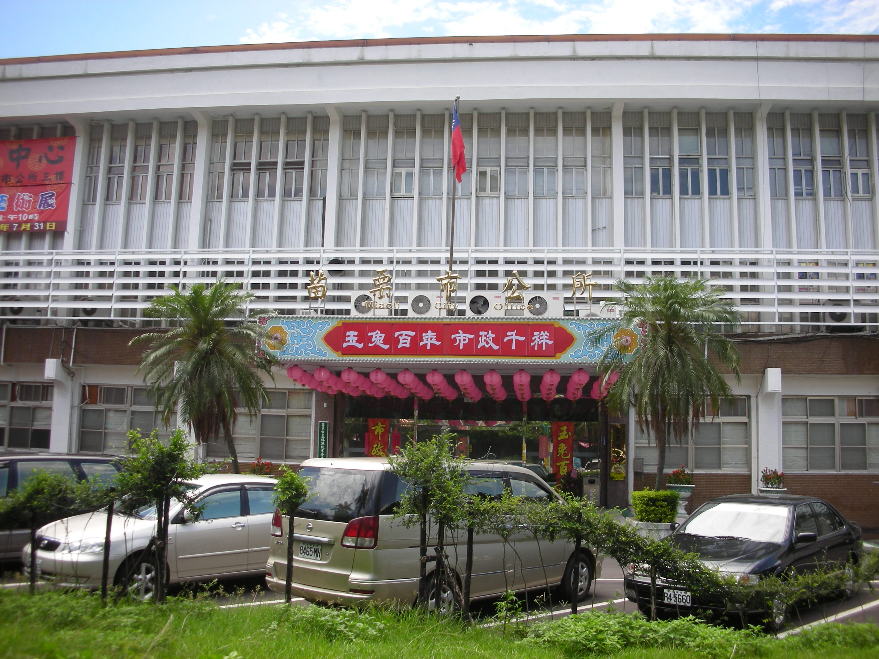 中文（台灣）: 苗栗縣苗栗市公所。